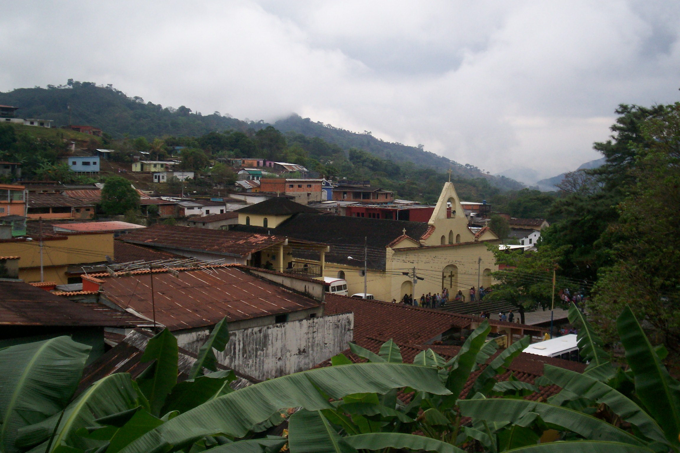 Iglesia de Calderas (Venezuela) desde lo alto